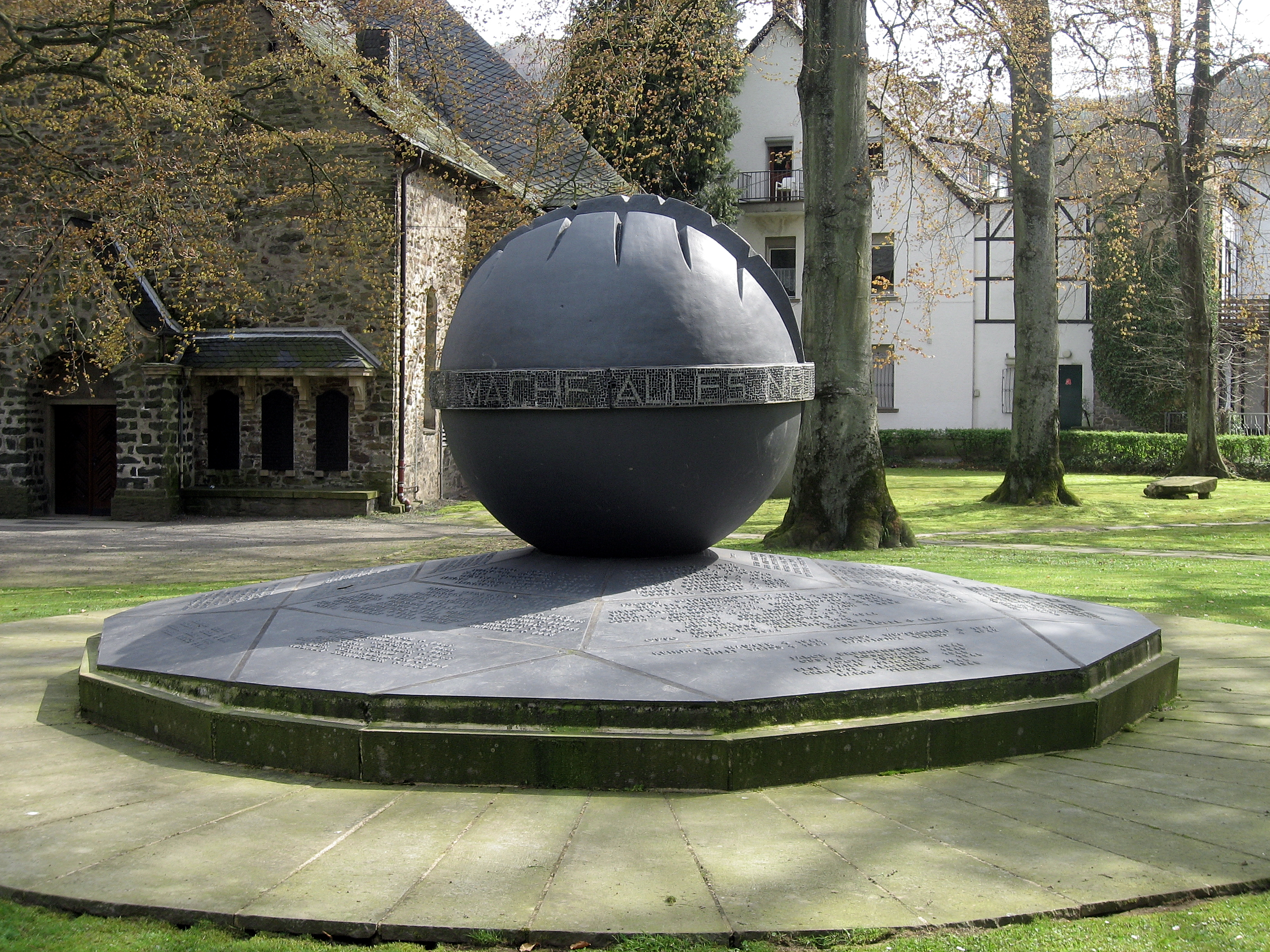 Deutschland, NRW, Westfalen, Kriegerdenkmal, Hagen-Dahl Das Mahnmal aus dem Jahre 1957 von Ewald Mataré stellt die am Ende des zweiten weltkriegs in zwei Hälften zerfallende Erdkugel dar. Die aus Eisen geformte Kugel wird von einem Spruchband aus Glasmosaik umgeben, das die Worte: "Siehe, ich mache alles neu" aus der Offenbarung Johannis trägt. 24 Eisenplatten auf dem Steinsockel tragen die Namen der im Weltkrieg gefallenen Dahler.